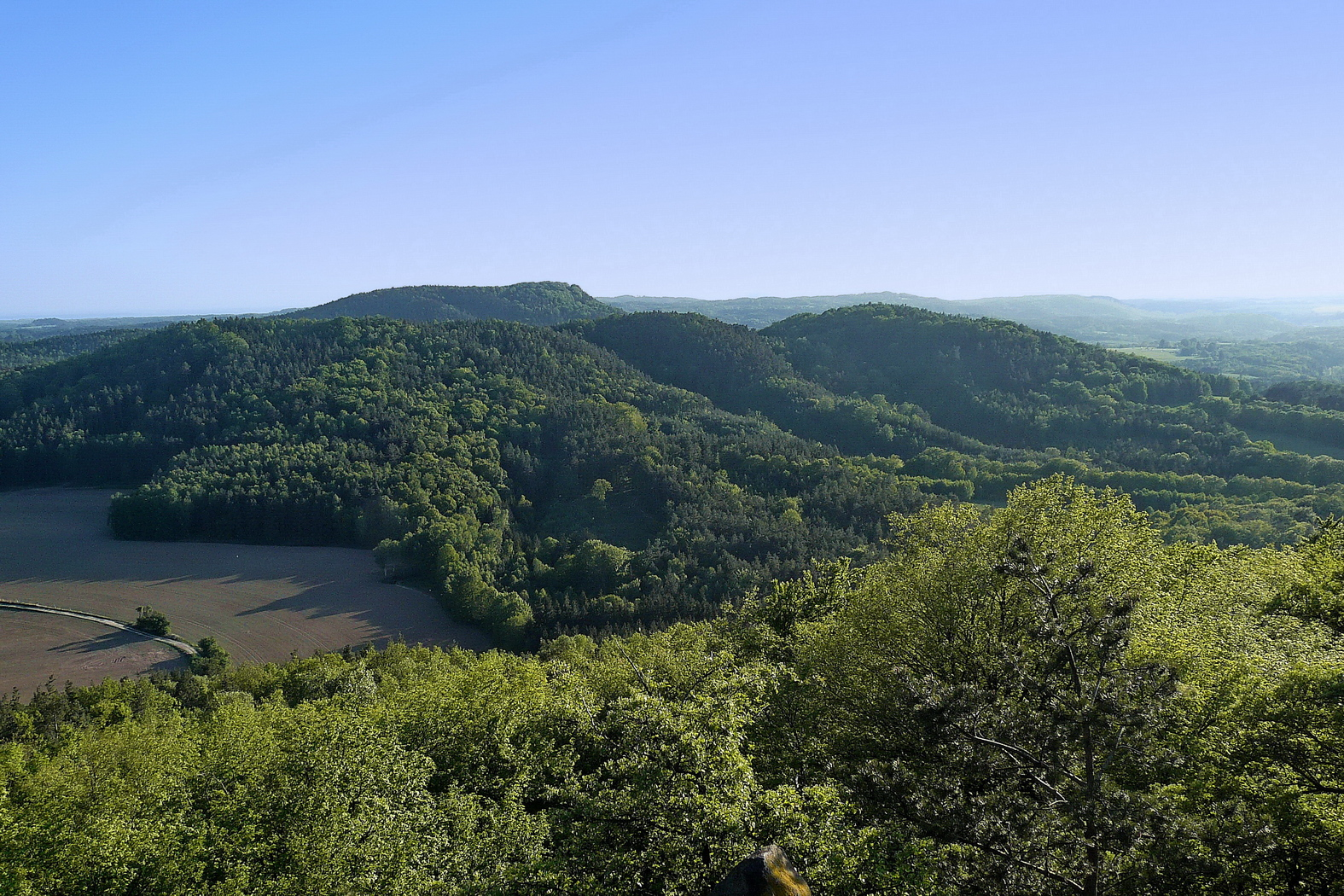 Pohled z Koreckého vrchu na hřbet Vysokého vrchu, za ním Velký Beškovský kopec